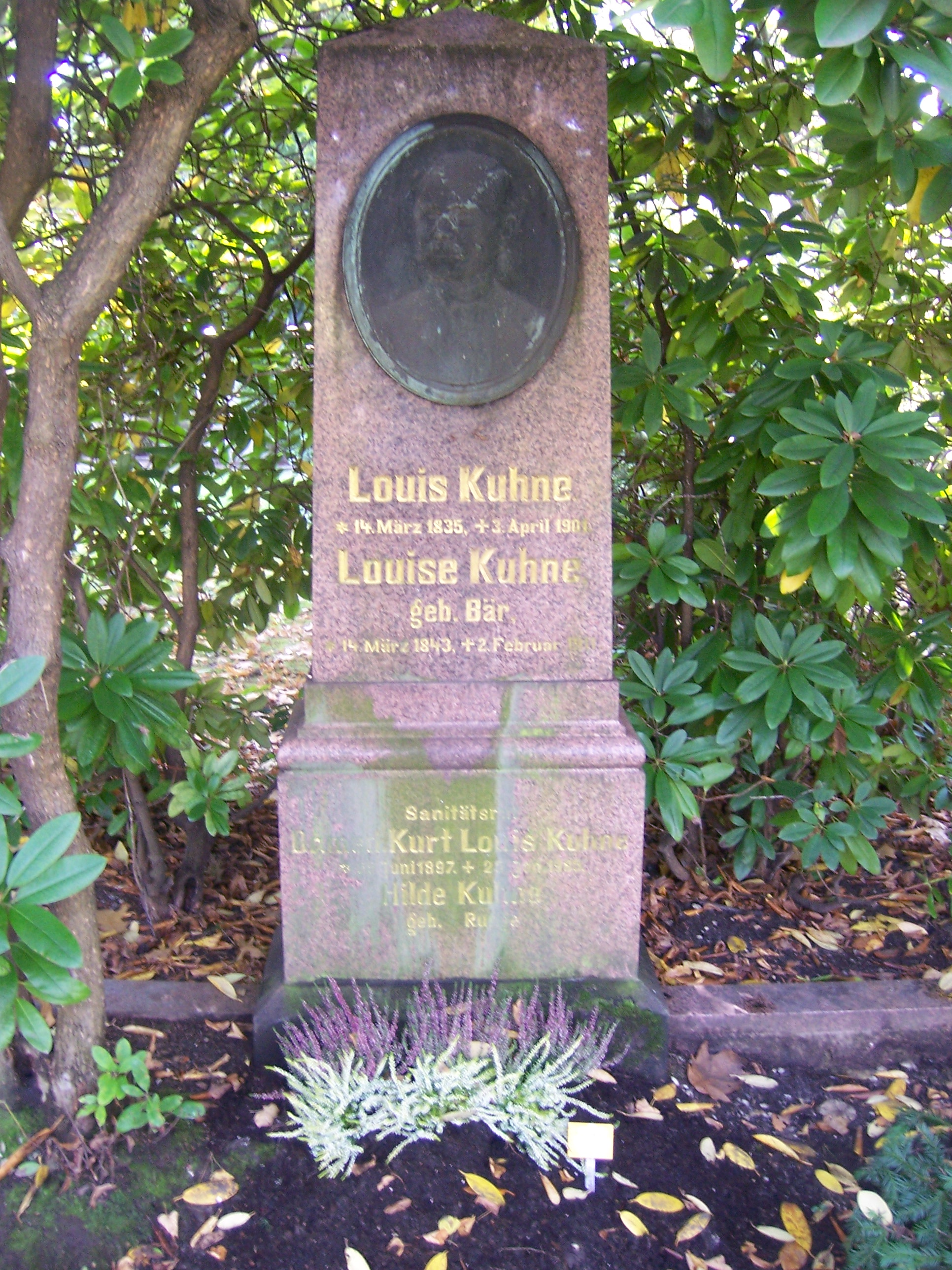 Grabstätte Louis Kuhne und Angehörige